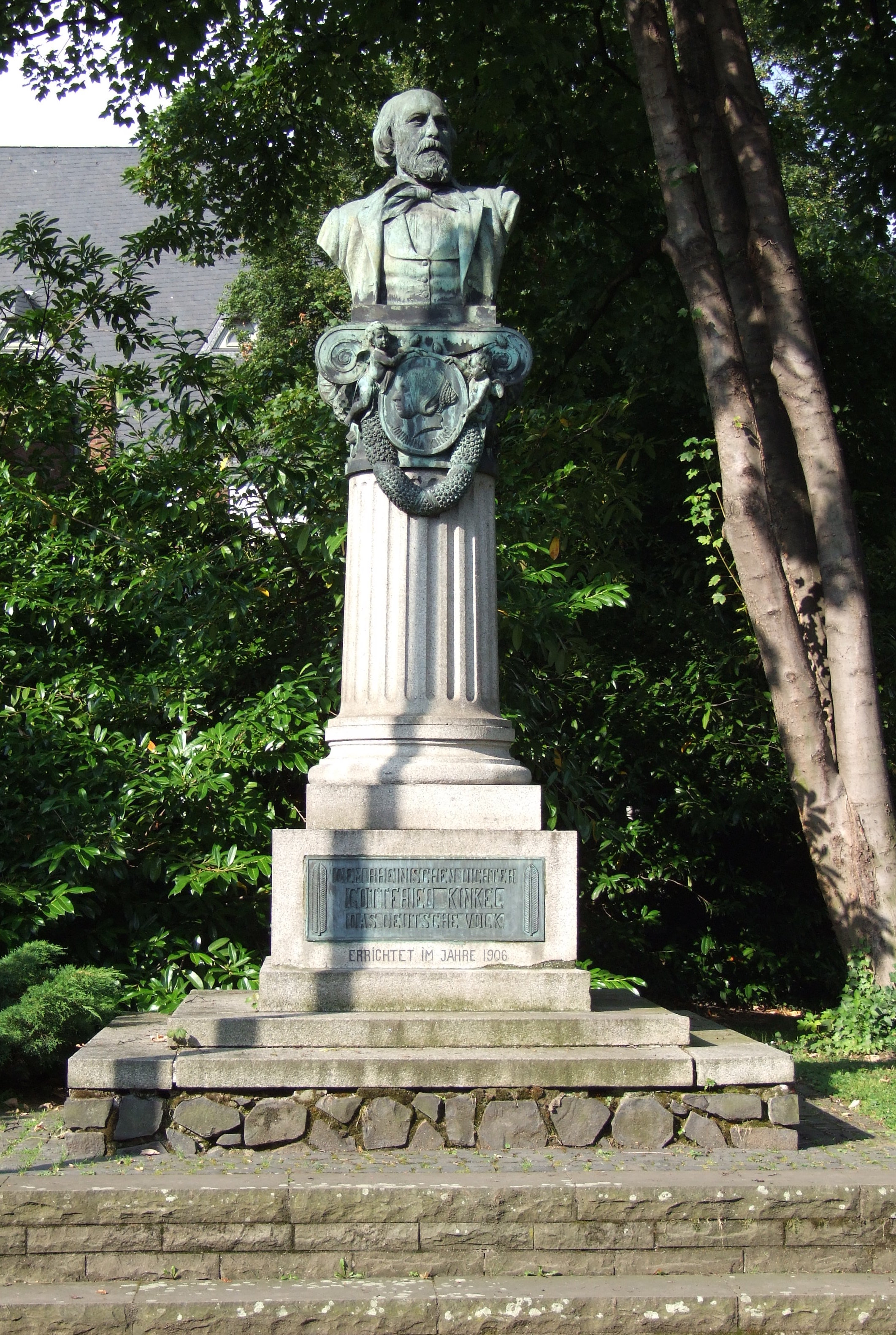 Gottfried Kinkel-Denkmal in Bonn-Oberkassel Das Denkmal wurde Kinkel in Anerkennung seiner dichterischen Leistungen auf Initiative des Regierungsrates Josef Joesten errichtet. Aus einem Wettbewerb ging der Düsseldorfer Bildhauer Gustav Rutz hervor, der 1905/06 die ionische Säule mit der Portraitbüste und dem Sockel mit den drei Bronzereliefs schuf. Auf einem Sockel erhebt sich eine kurze, kannelierte Säule ionischer Stilrichtung